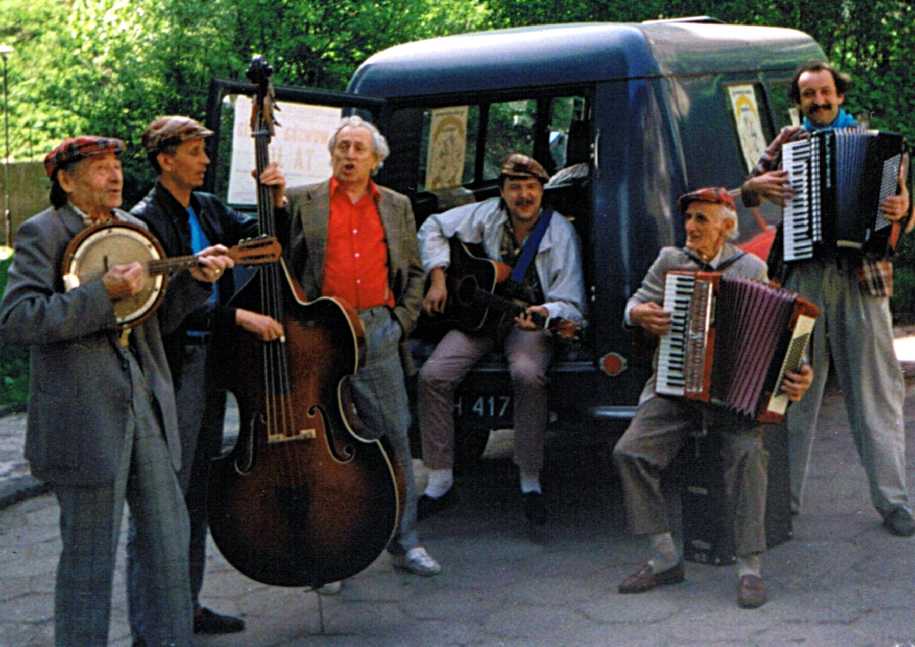 Lwowska Kapela Ta Joj z Przemyśla - skład z początku lat dziewięćdziesiątych. Od lewej: Od lewej: Kazimierz "Kiju" Galikowski, Andrzej "Cichy" Daczkowski, Adam "Łyżka" Wojdyło, Artur "Ciamkacz" Dobiszewski, Tadeusz "Tida" Wanat, Janusz "Mimoza" Krupa